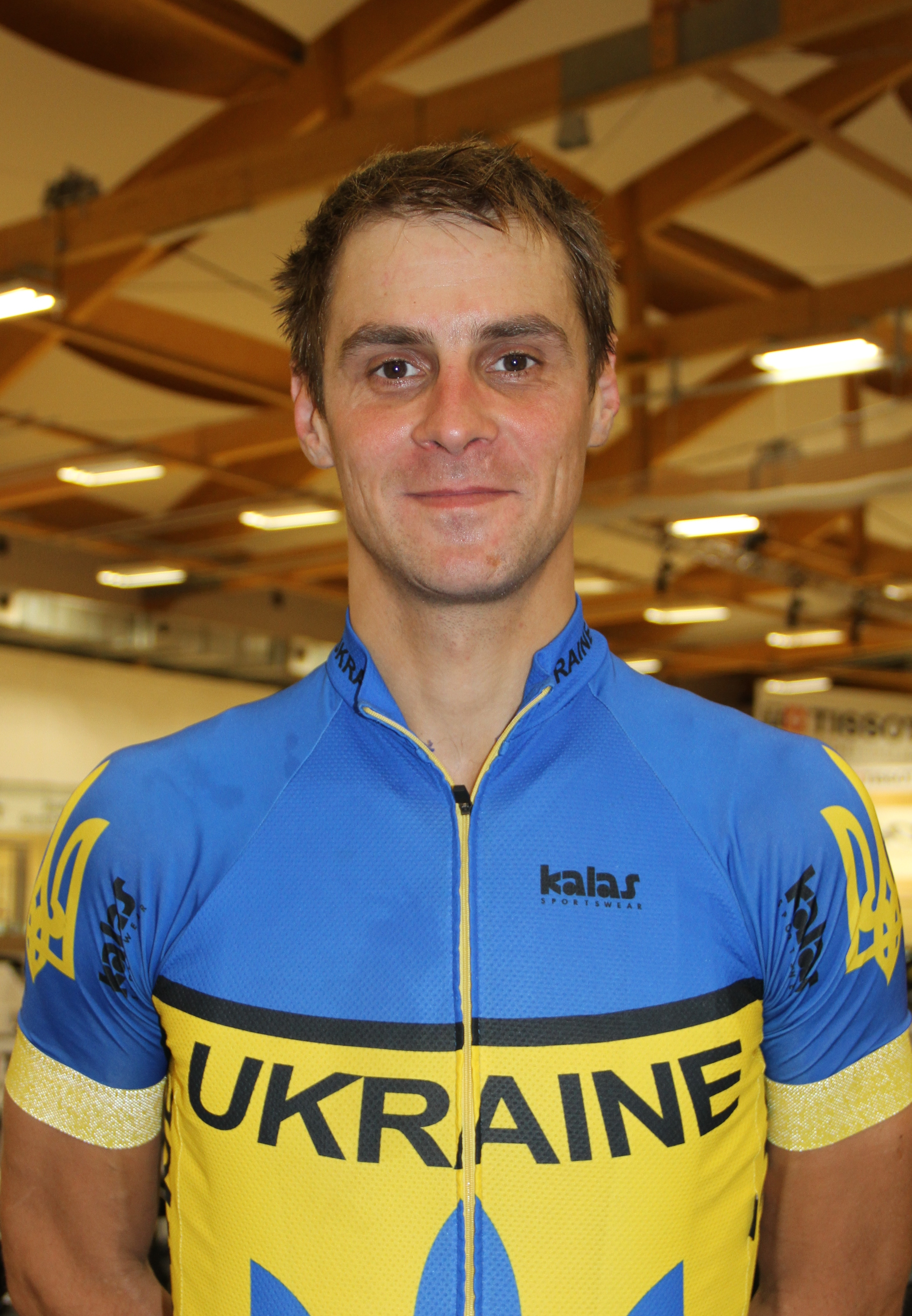 Volodymyr Dyudya, ukrainischer Radsportler The making of this document was supported by the Community-Budget of Wikimedia Germany.